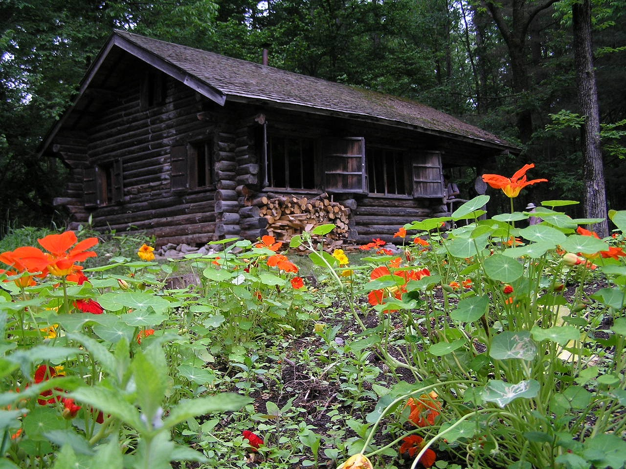 麓郷の森 黒板五郎の丸太小屋 Akiyoshi's Room